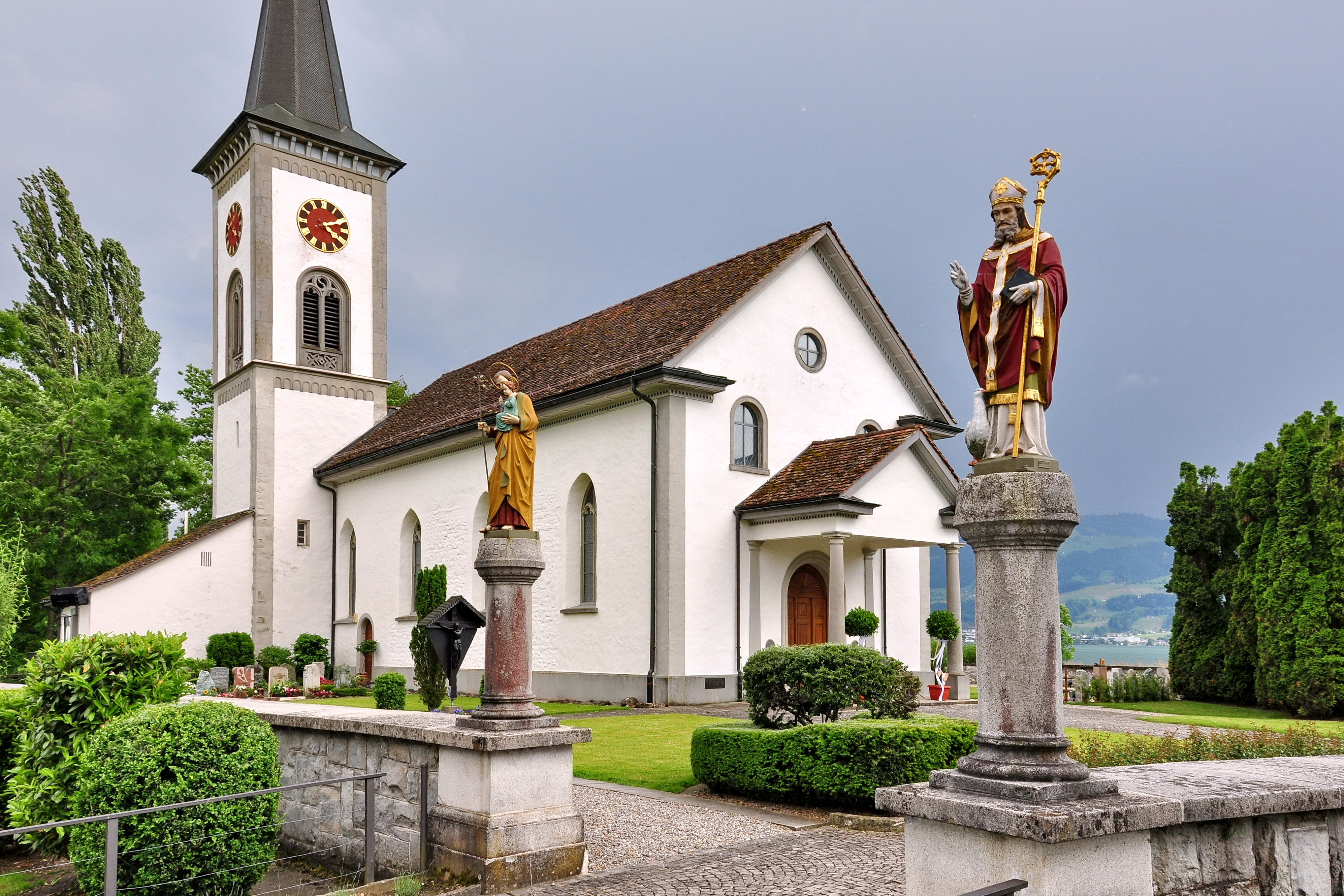 St. Martin Busskirch in Jona (SG) on Obersee (upper Lake Zürich) shore